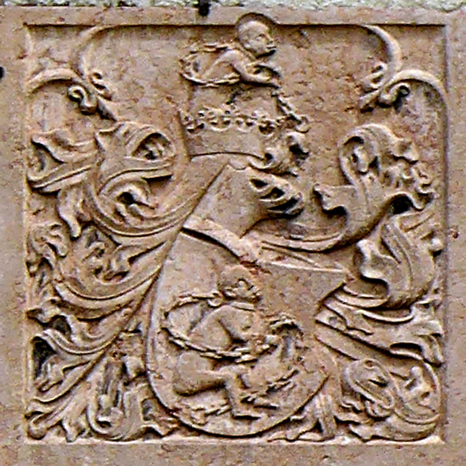 Wappen der Prager. Rötlicher Marmor. Er befindet sich eingemauert in der der Donau zugewandten Aussenmauer des Schlosses Pragstein im Mauthausen in Oberösterreich. Mit Darstellung von 2 angeketteten Affen (Meerkatzen). Foto 2019. Ein ähnlicher Wappenstein ist über dem Eingang des Forsthauses (früher Hoftaverne) in Windhaag, Forsthausstrasse 1, eingenmauert.